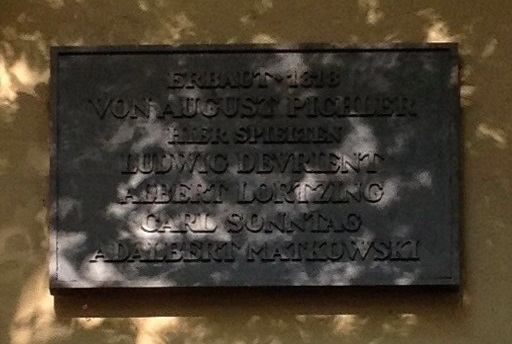 Bad Pyrmont, Schauspielhaus (Kurtheater), Gedenktafel